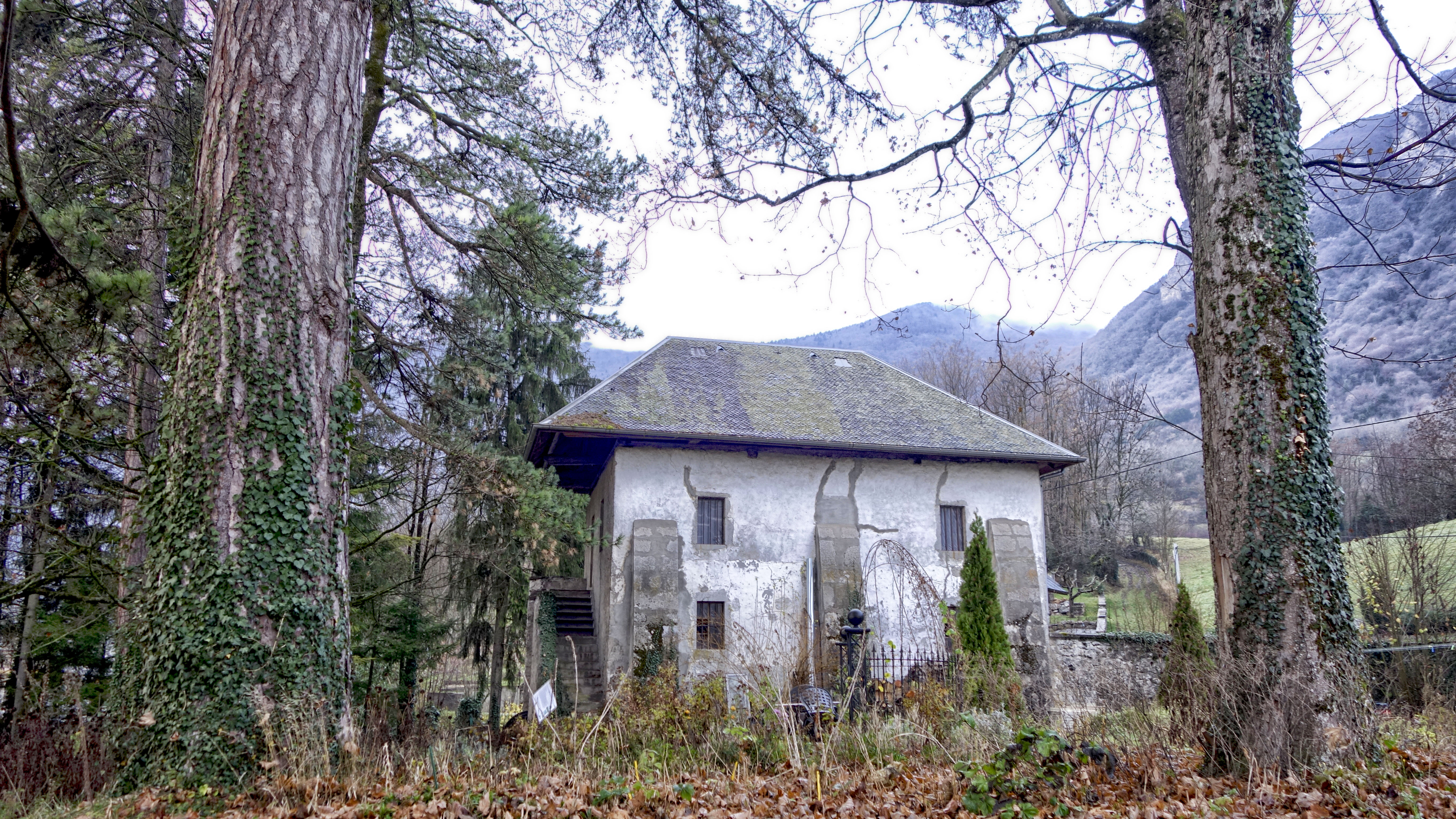 L'ancien moulin à eau du château des Allues, abritait un martinet et une forge